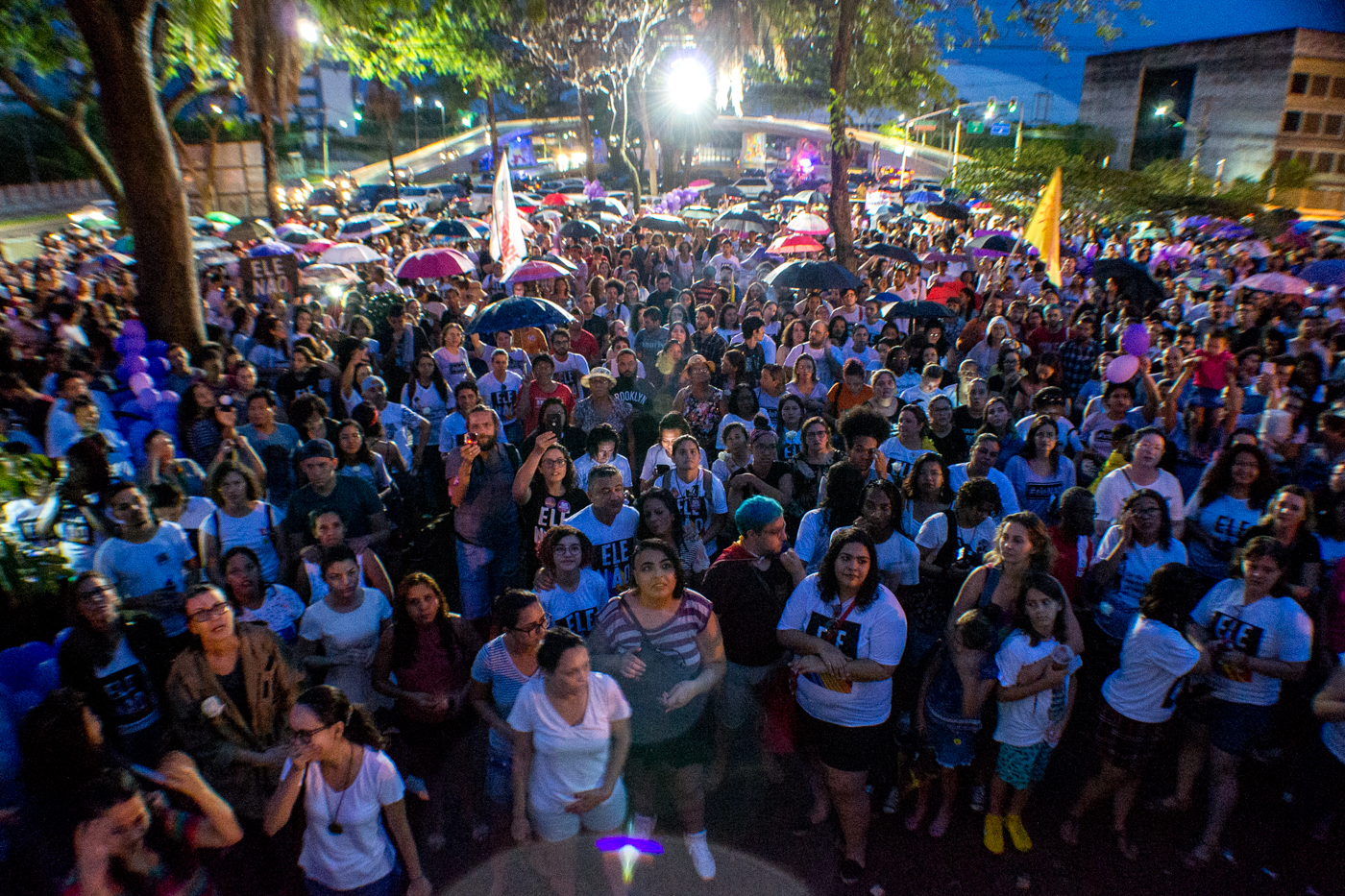 Manifestação contra o candidato à presidência Jair Bolsonaro em no Monumento Ulisses Guimarães, Cuiabá, Mato Grosso, Brasil. 29 de setembro de 2018 Foto por Paulisson Miura